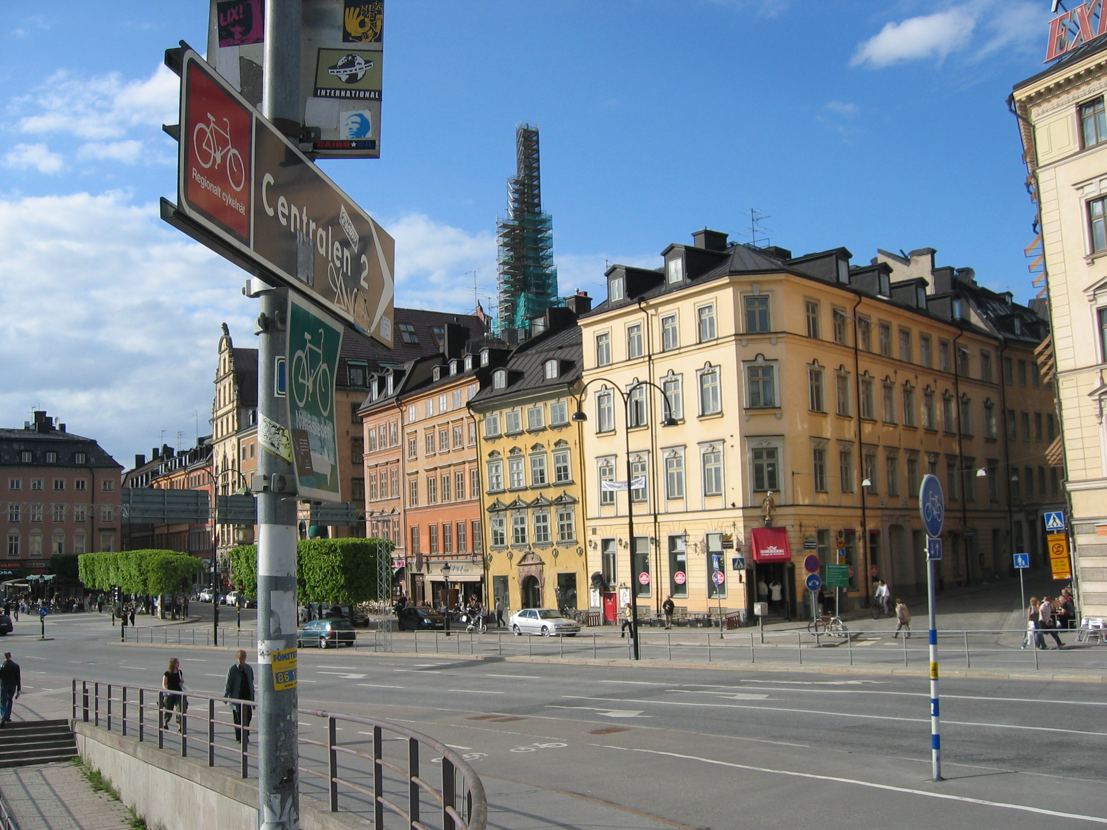 gamla stanIMG_2277